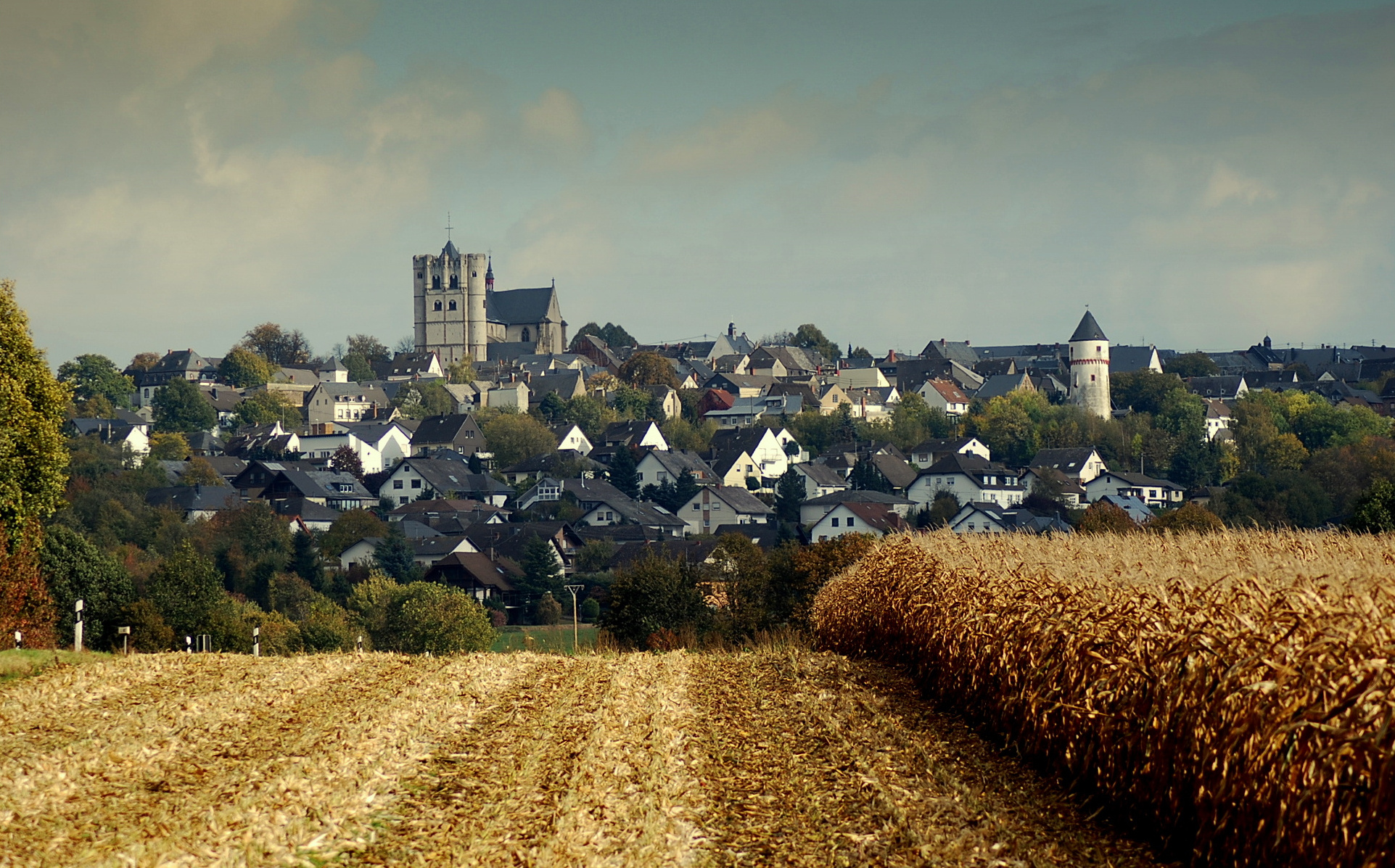 Münstermaifeld vanuit het westen met de zwaarversterkte toren van de St. Martinus en St. Severuskerk.